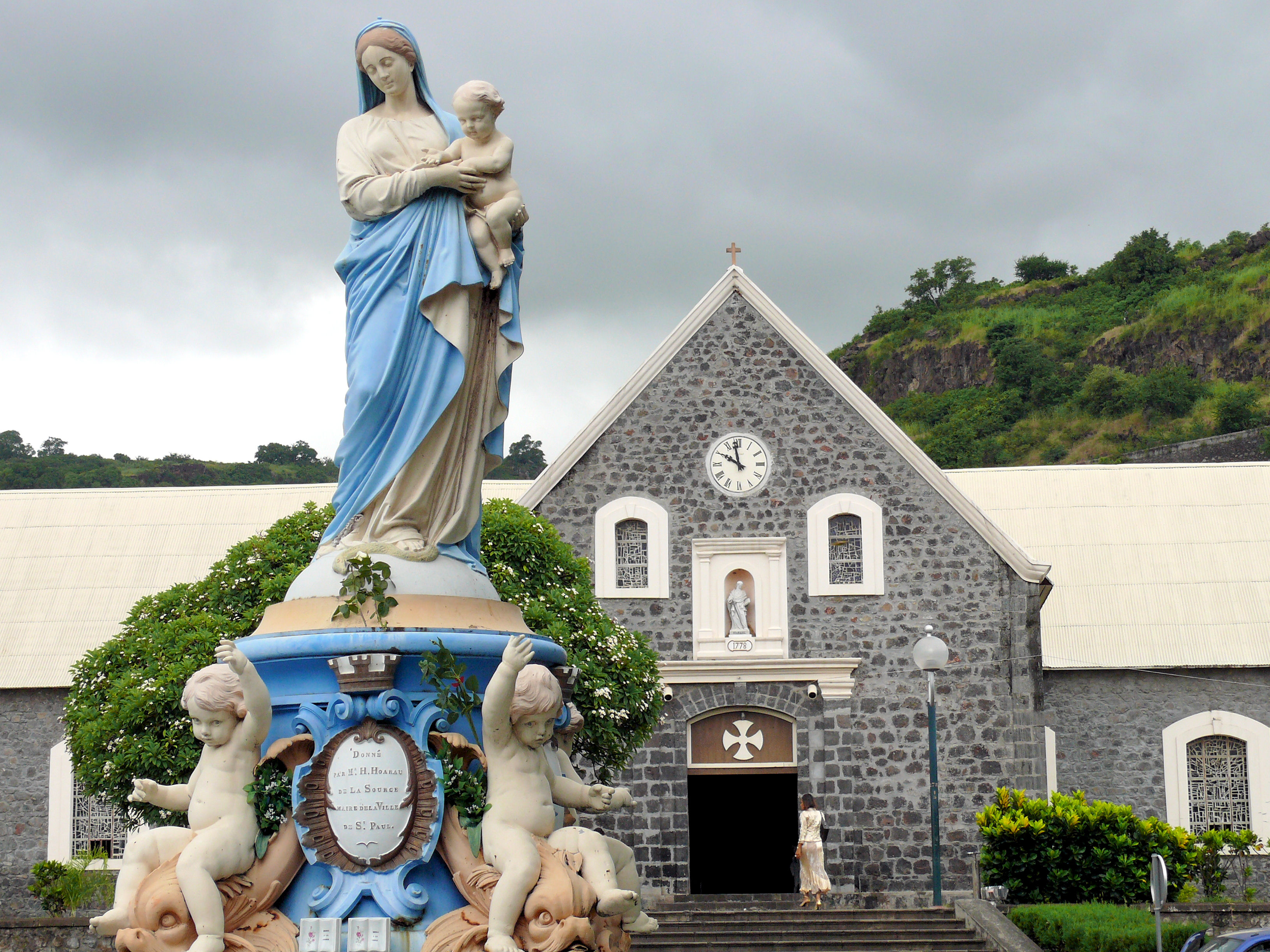 Saint-Paul (La Réunion) - Eglise de la Conversion de Saint-Paul .